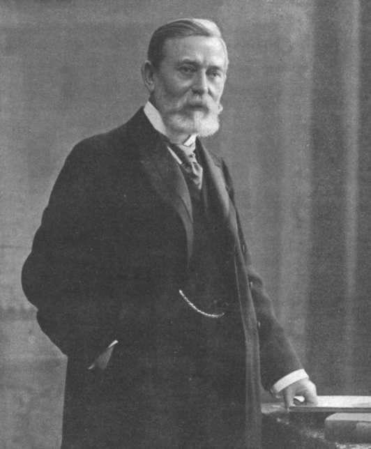 Léonard Blomme (Anvers 1840 ― idem 1918), architecte néo-gothique et néo-renaissance belge (flamand).